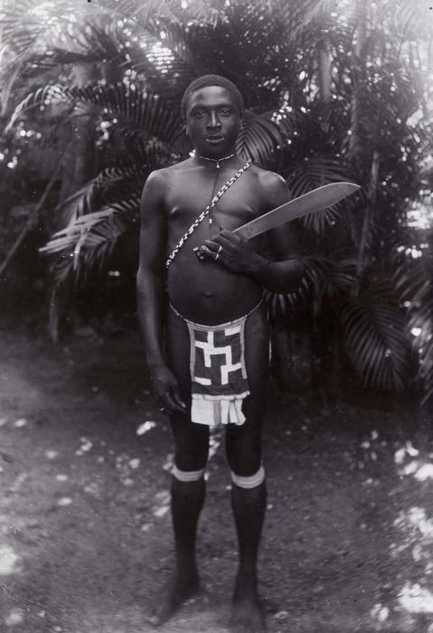 Foto. Portret van een Marron met kapmes